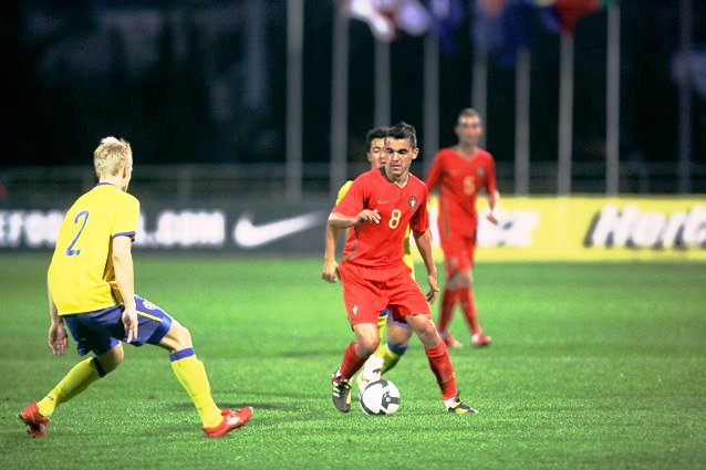 Ricardo Matins con Portugal Sub - 20